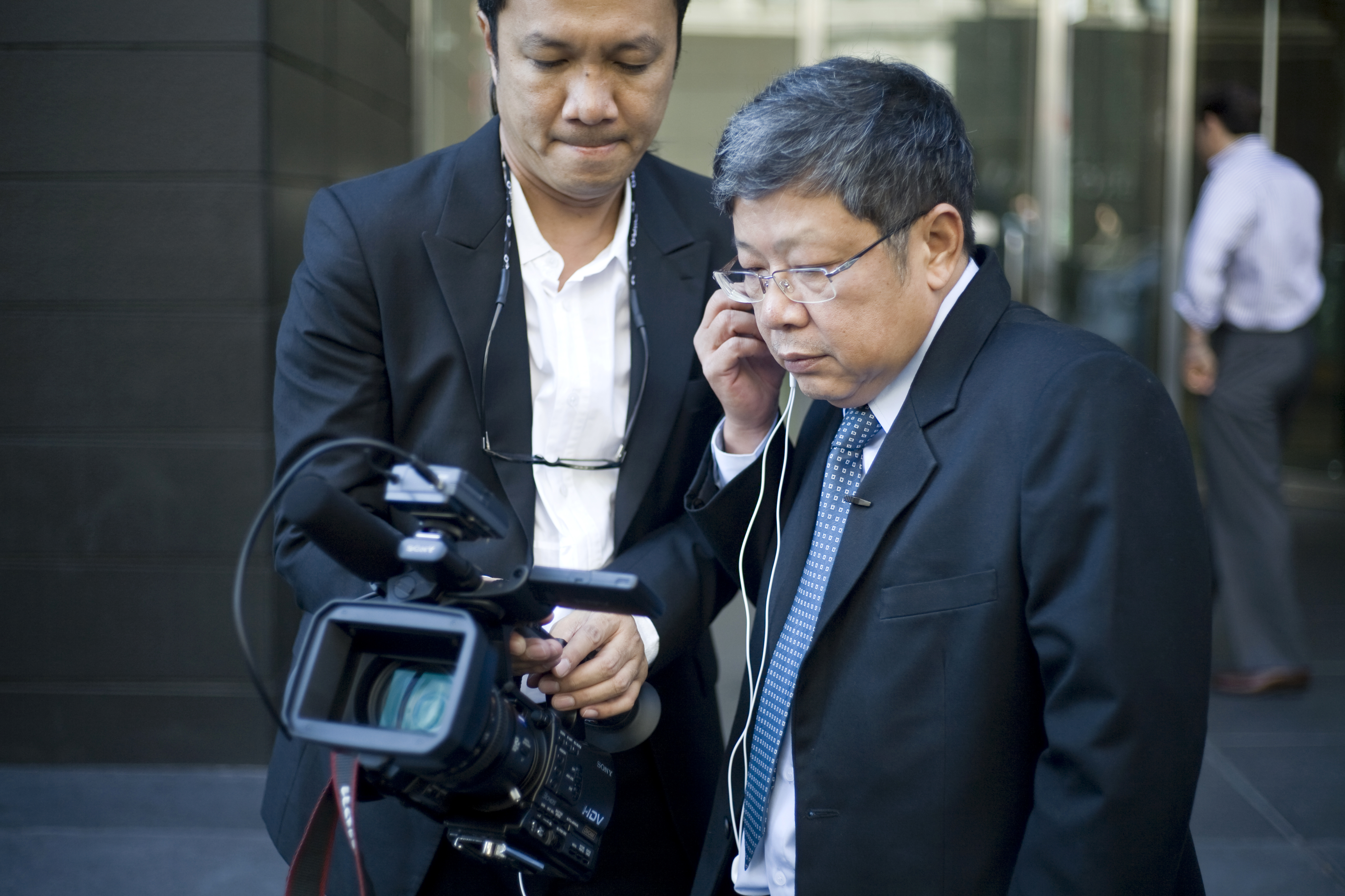 อ.วีระ ธีรภัทร และ คุณภูษิต ทีมงานรายการเชื่อมั่นประเทศไทยกับนายกอภิสิทธิ์ / นายกรัฐมนตรี เข้าร่วมการประชุมสมัชชาสหประชาชาติ สมัยสามัญ ครั้งที่ 64 และการประชุม Pittsburgh Summit ณ นครนิวยอร์ก สหรัฐอเมริกา ระหว่าง วันที่ 21-27กันยายน 2552 (The Official Site of The Prime Minister of Thailand Photo by พีรพัฒน์ วิมลรังครัตน์)